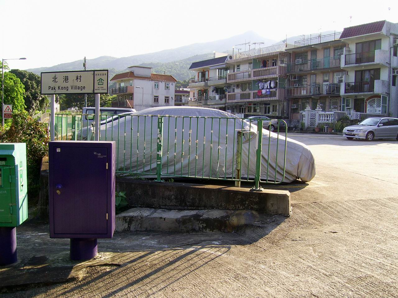 中文（香港）: 北港村 (西貢)